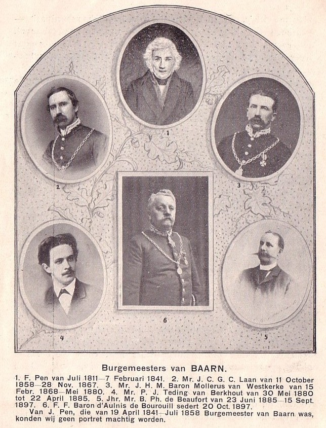 Burgemeesters van Baarn, verzamelde afbeeldingen. Onderschrift: Burgemeesters van Baarn. 1. F. Pen van Juli 1811—7 Februari 1841. 2. Mr. J. C. G. C. Laan van 11 October 1858—28 Nov. 1867. 3. Mr. J. H. M. Baron Mollerus van Westkerke van 15 Febr. 1868—Mei 1880. 4. Mr. P. J. Teding van Berkhout van 30 Mei 1880 tot 22 April 1885. 5. Jhr. Mr. B. Ph. de Beaufort van 23 Juni 1885—15 Sept. 1897. 6. F.F. Baron d'Aulnis de Bourouill sedert 20 Oct. 1897. Van J. Pen, die van 19 April 1841—Juli 1858 Burgemeester van Baarn was, konden wij geen portret machtig worden.